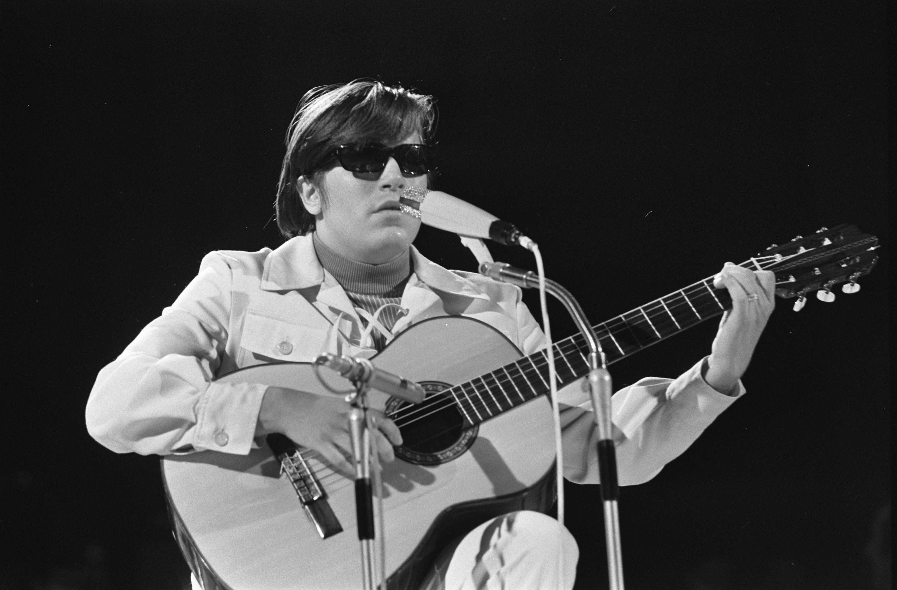 Collectie / Archief : Fotocollectie Anefo Reportage / Serie : [ onbekend ] Beschrijving : Grand Gala du Disque in RAI Amsterdam. Repetities. Feliciano Datum : 26 februari 1970 Locatie : Amsterdam, Noord-Holland Trefwoorden : REPETITIES Instellingsnaam : RAI Fotograaf : Mieremet, Rob / Anefo Auteursrechthebbende : Nationaal Archief Materiaalsoort : Negatief (zwart/wit) Nummer archiefinventaris : bekijk toegang 2.24.01.05 Bestanddeelnummer : 923-2994